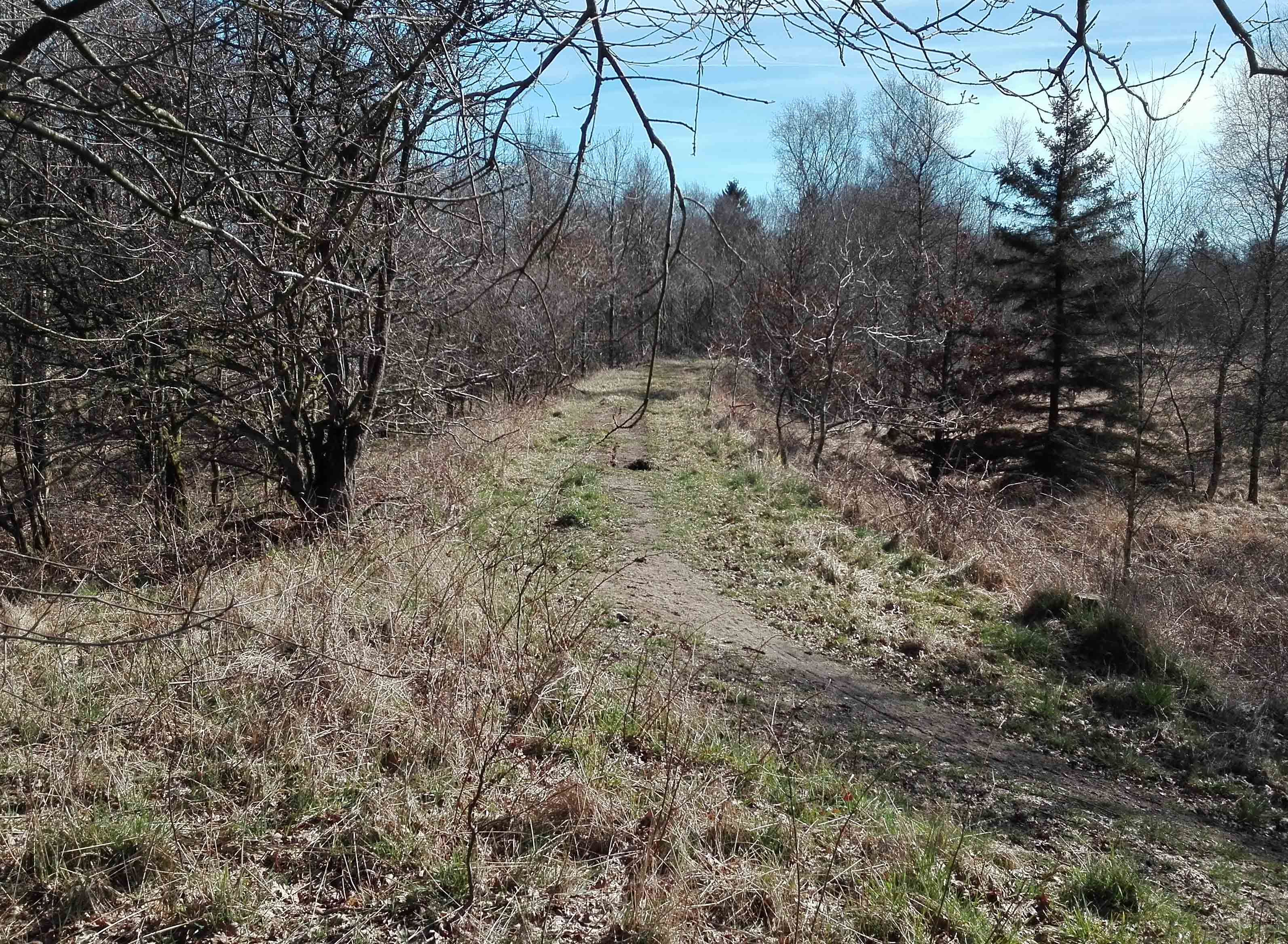 Aabenraa Amtsbaners tracé øst for Oksevejen ved Hovslund Stationsby